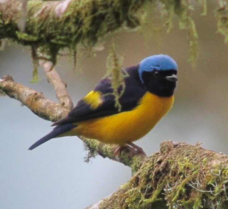 Cali, Valle, Colombia (Km. 18 , Finca Alejandría)